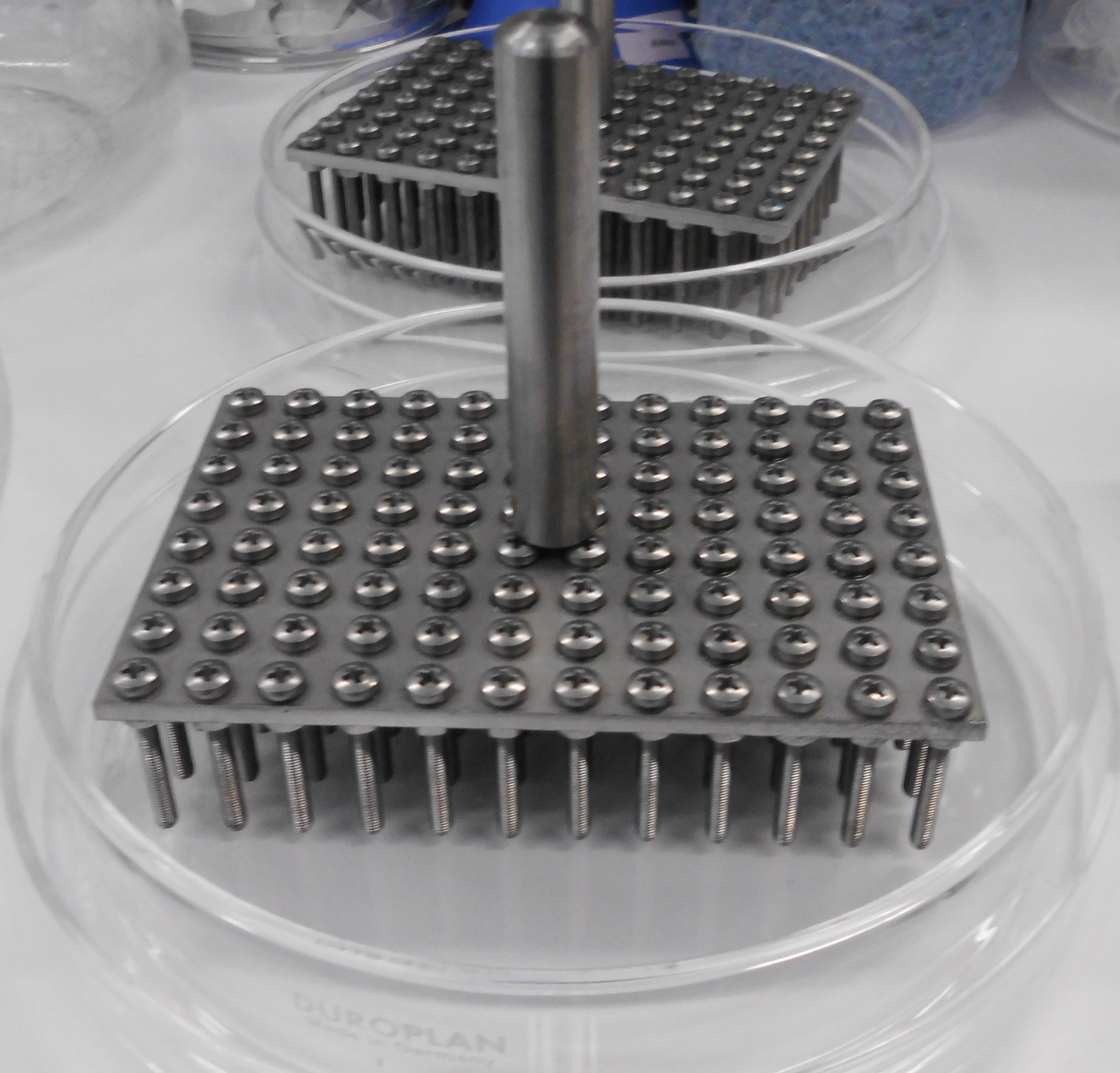 96 pinner used to perform spot assays with yeast or bacterial cells